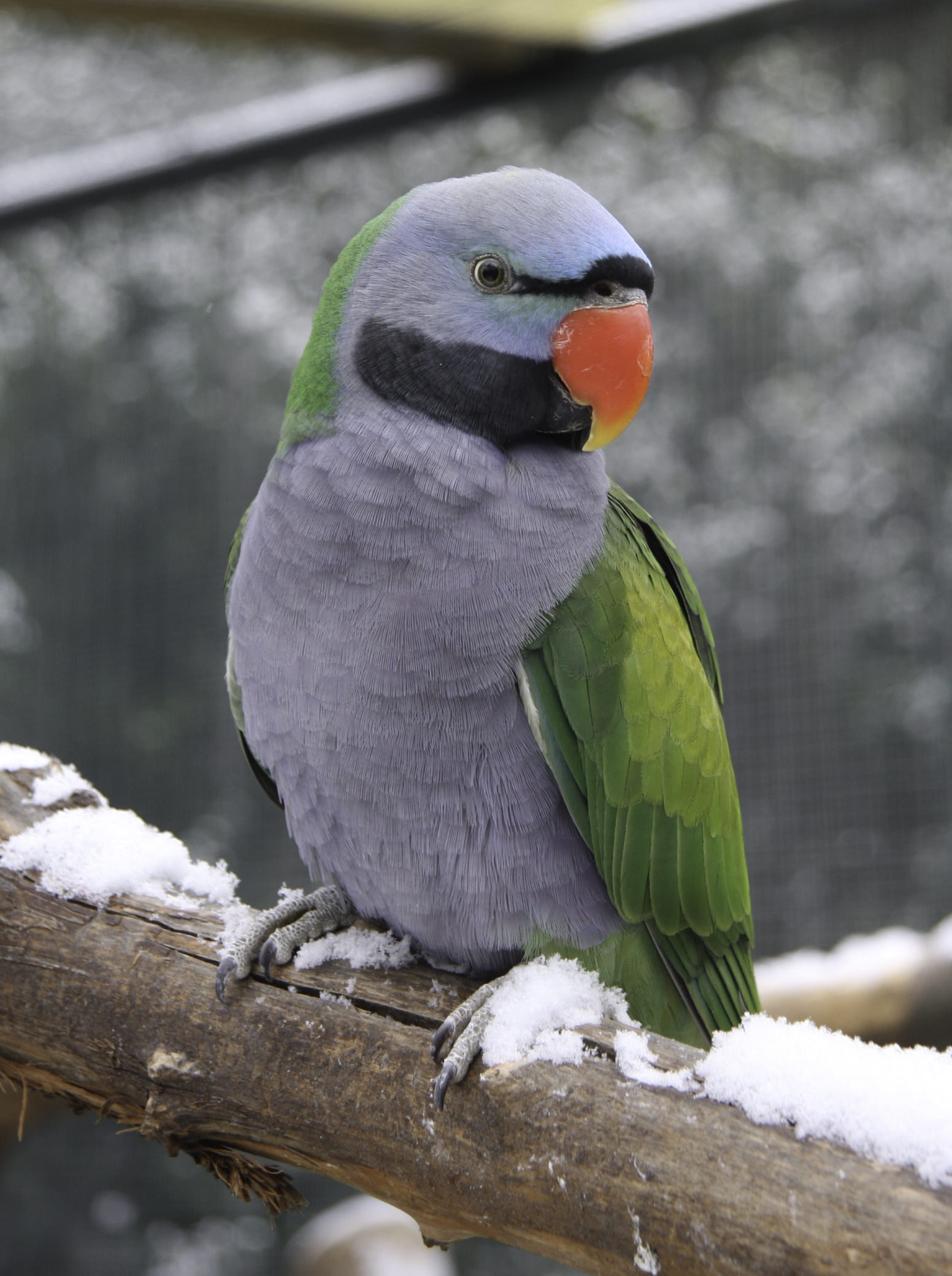 Chinasittich-Männchen im Tierpark Görlitz